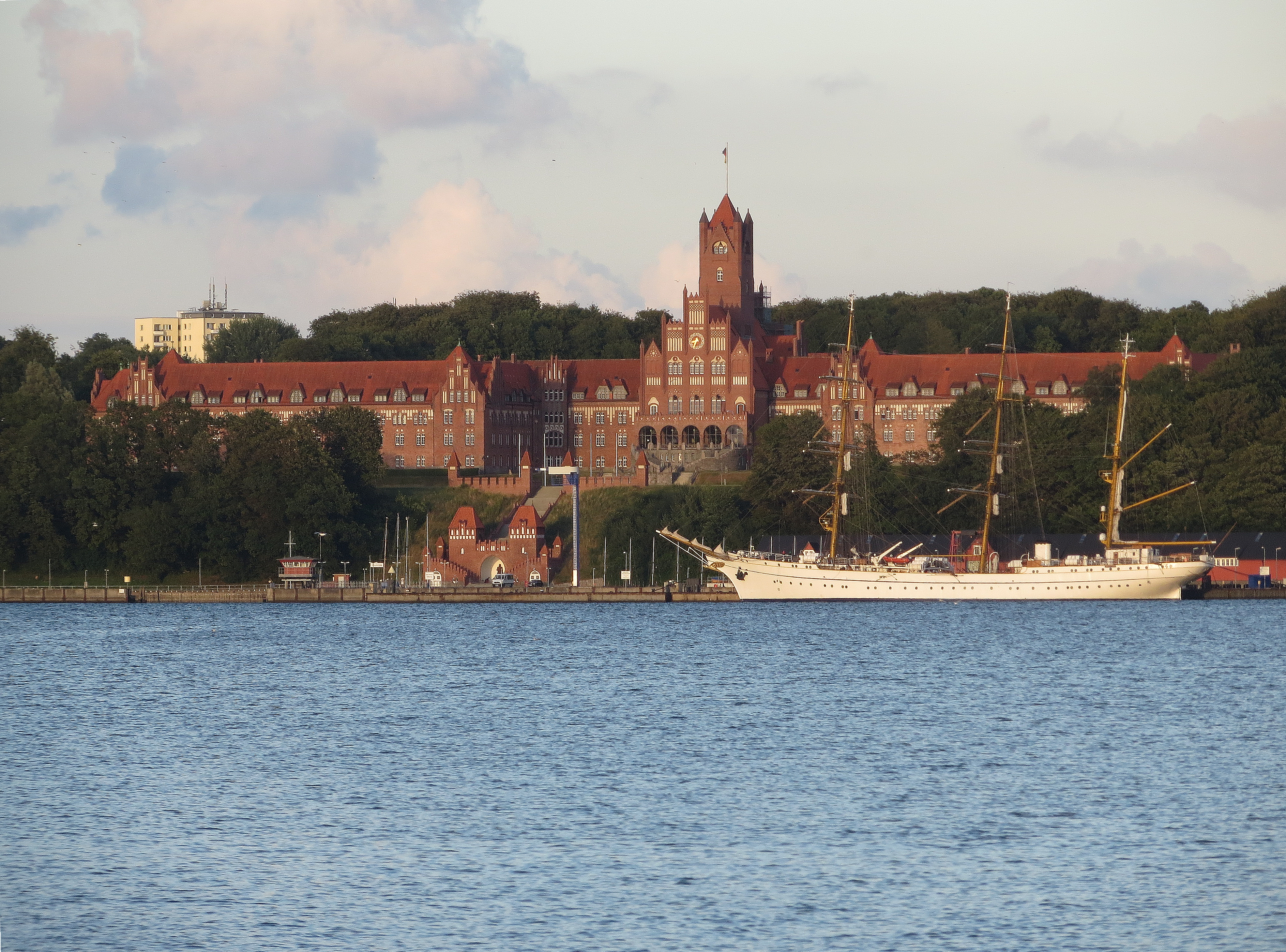 Red Castle with Gorch Fock (Mürwik, July 2013), Pic 03